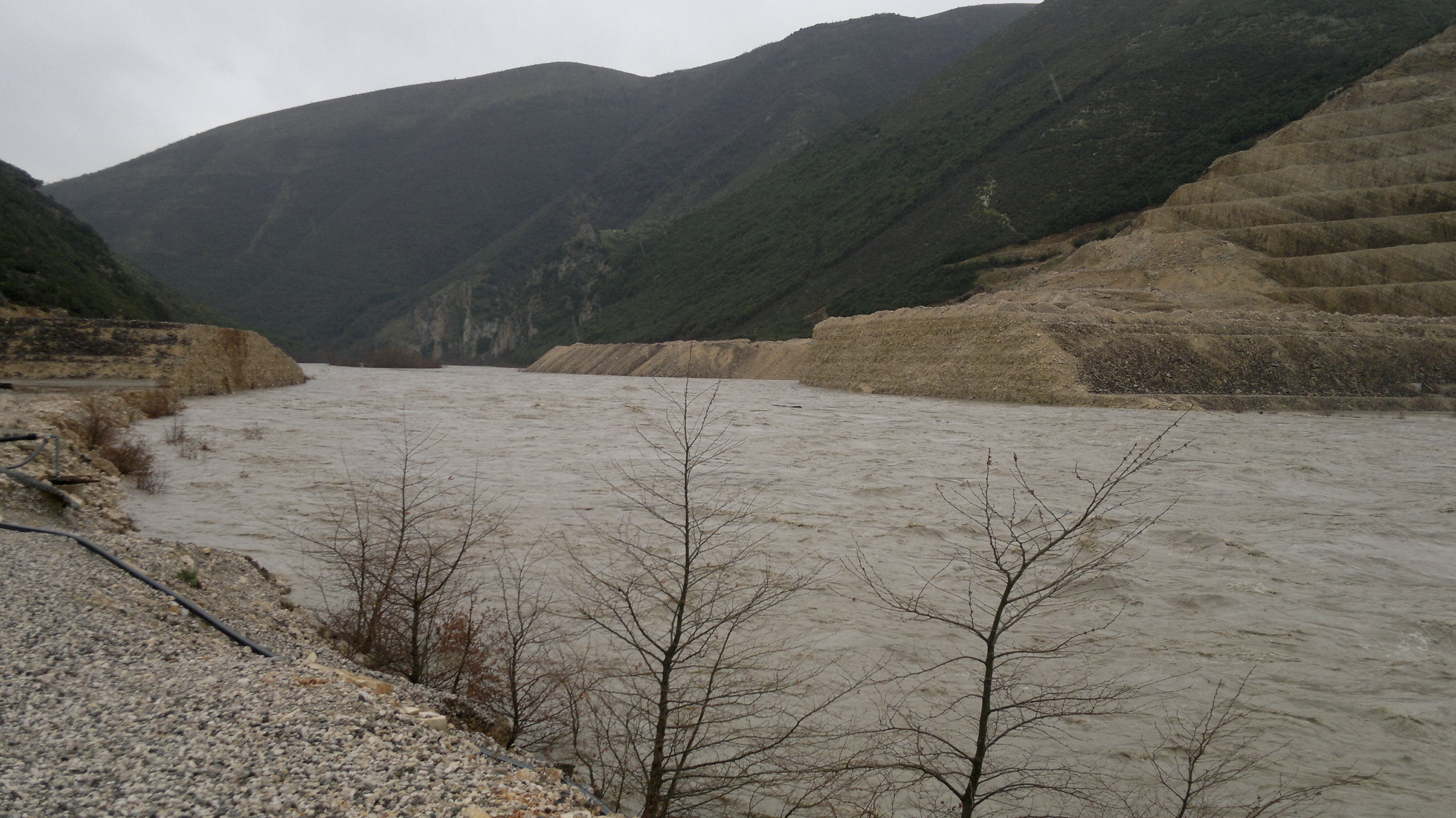 Pamje e Skembit te Lunecit nga HEC-i i Kalivacit